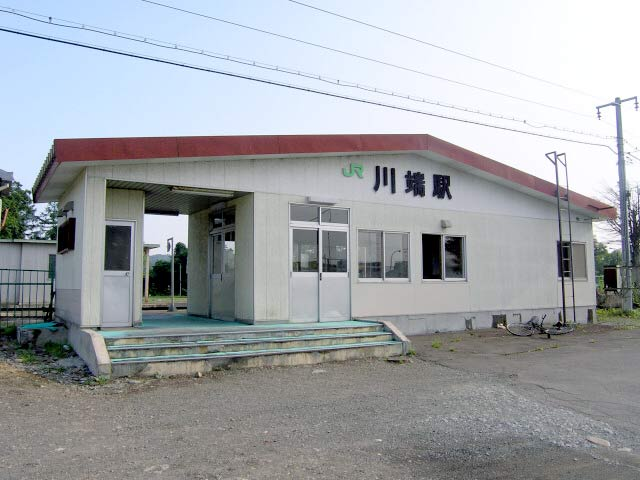 Kawabata Station in Sekisho Line, Japan